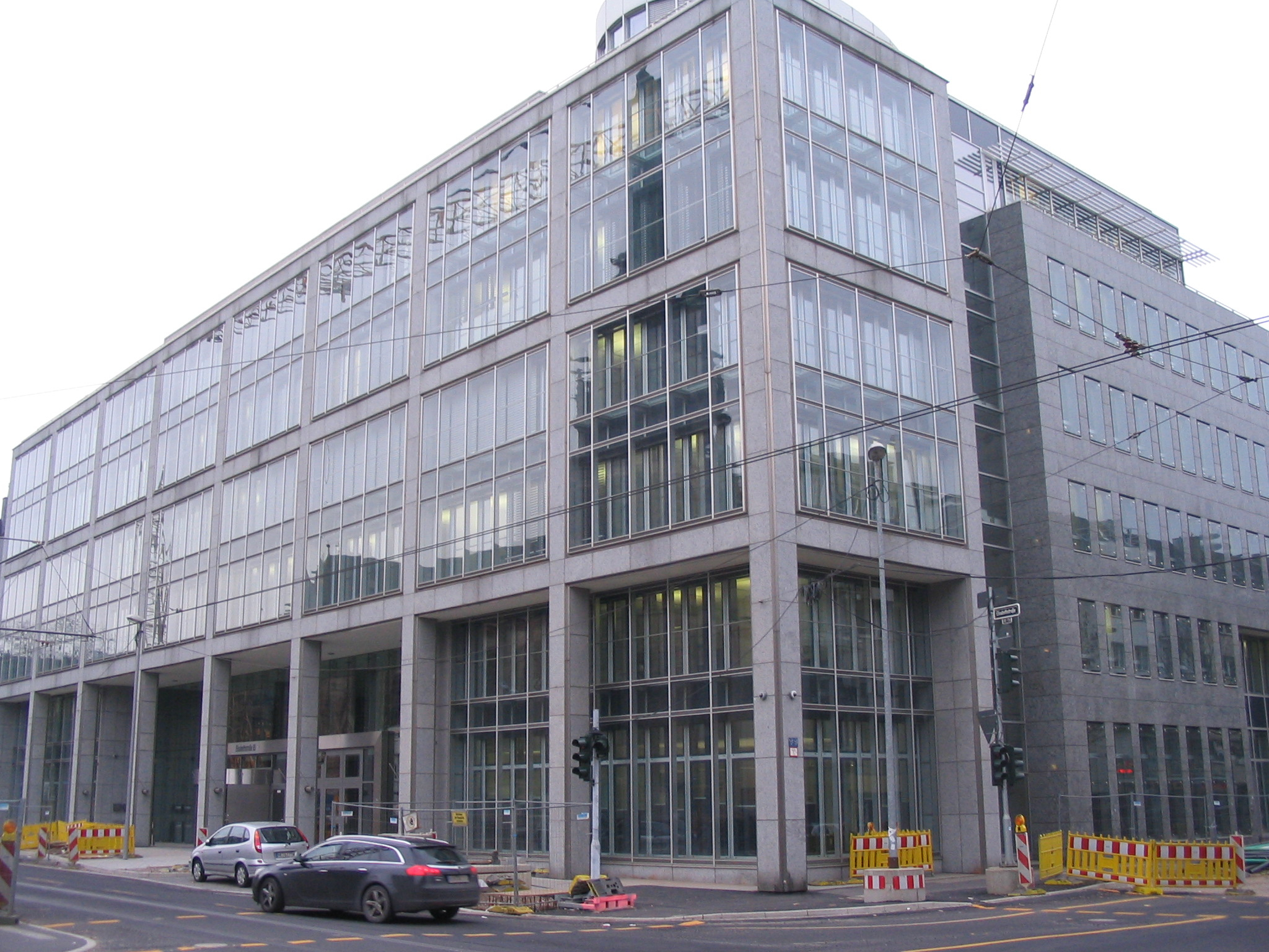 Düsseldorf, Elisabethstraße 65. Verwaltungsgebäude der Rheinischen Girozentrale und Provinzialbank.